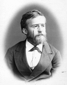 Škorpil Hermenegild